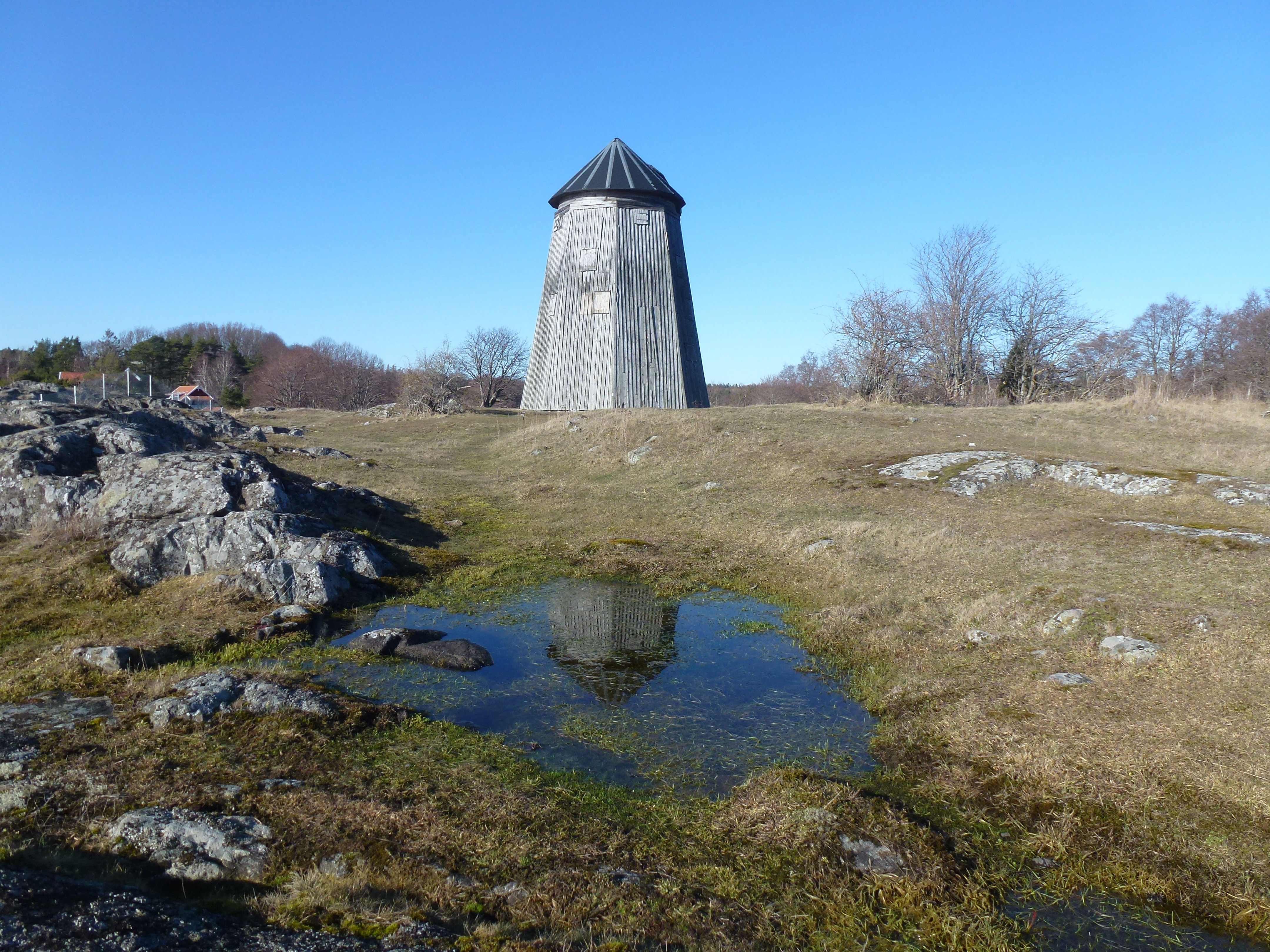 Herrhamra kvarn eller Ankaruddens väderkvarn